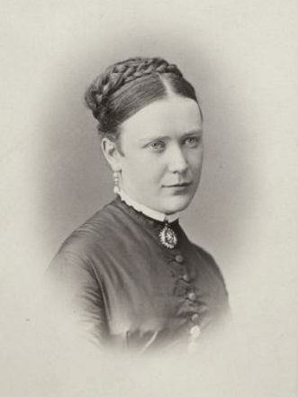 Княгиня Анна Николаевна Щербатова, ур. Бутурлина (1846—1906)